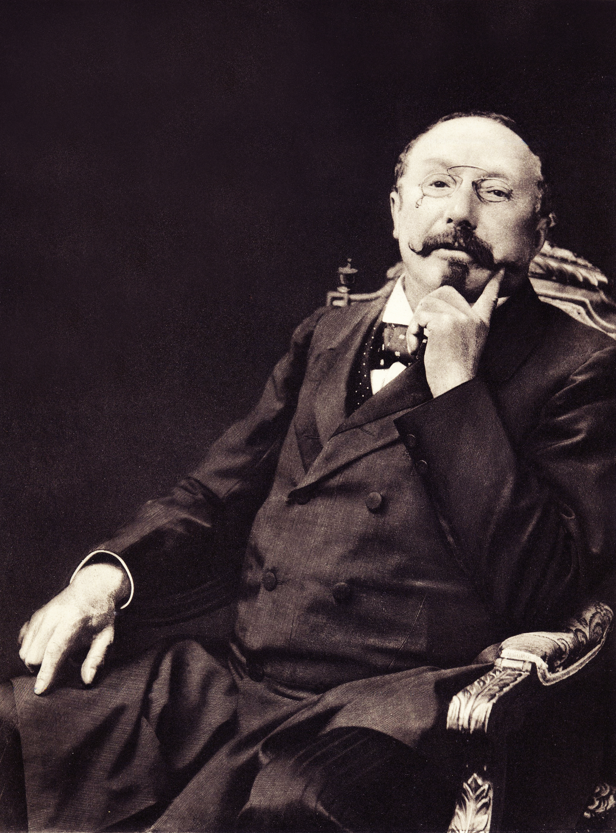 Crop + restauration image